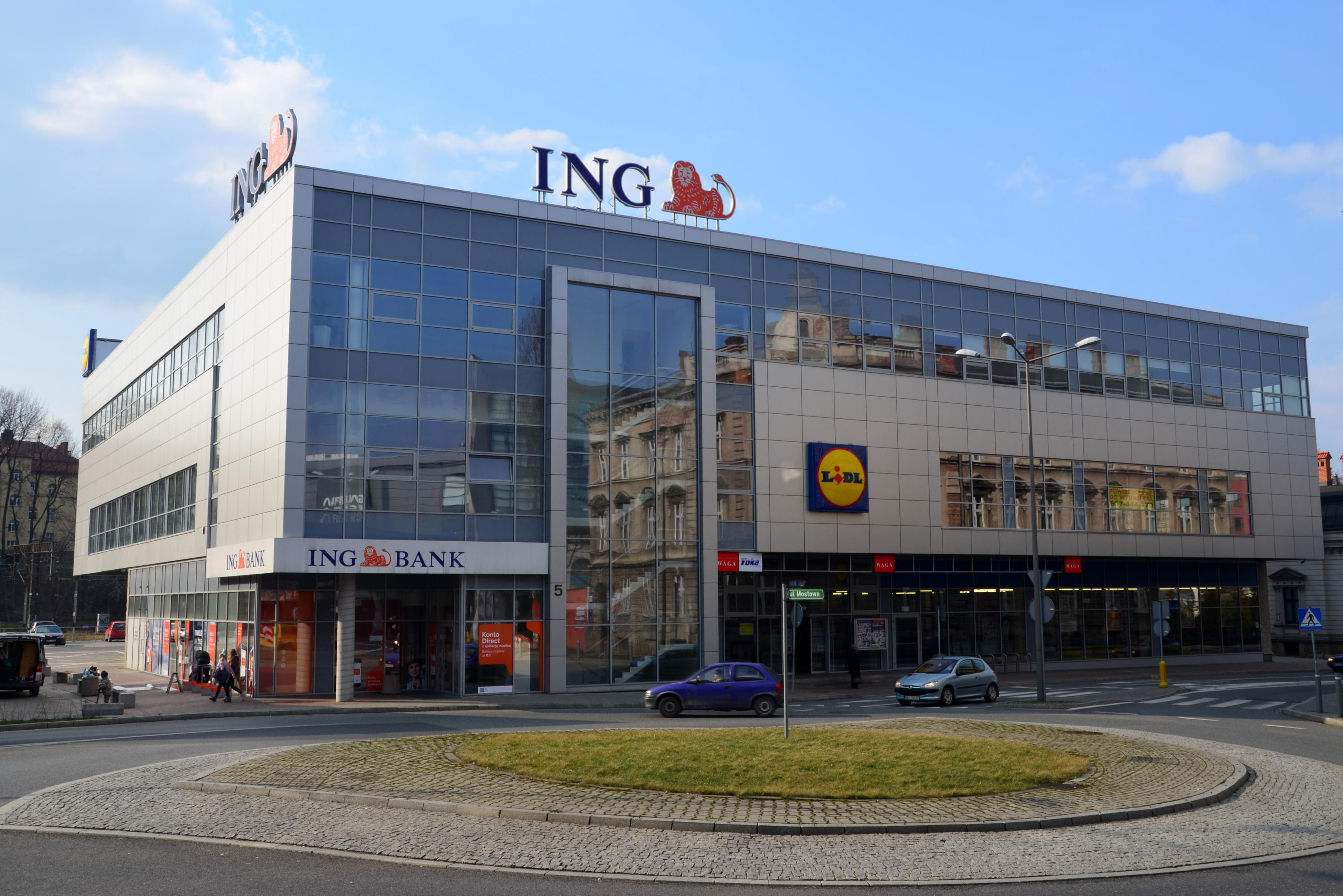 Lidl